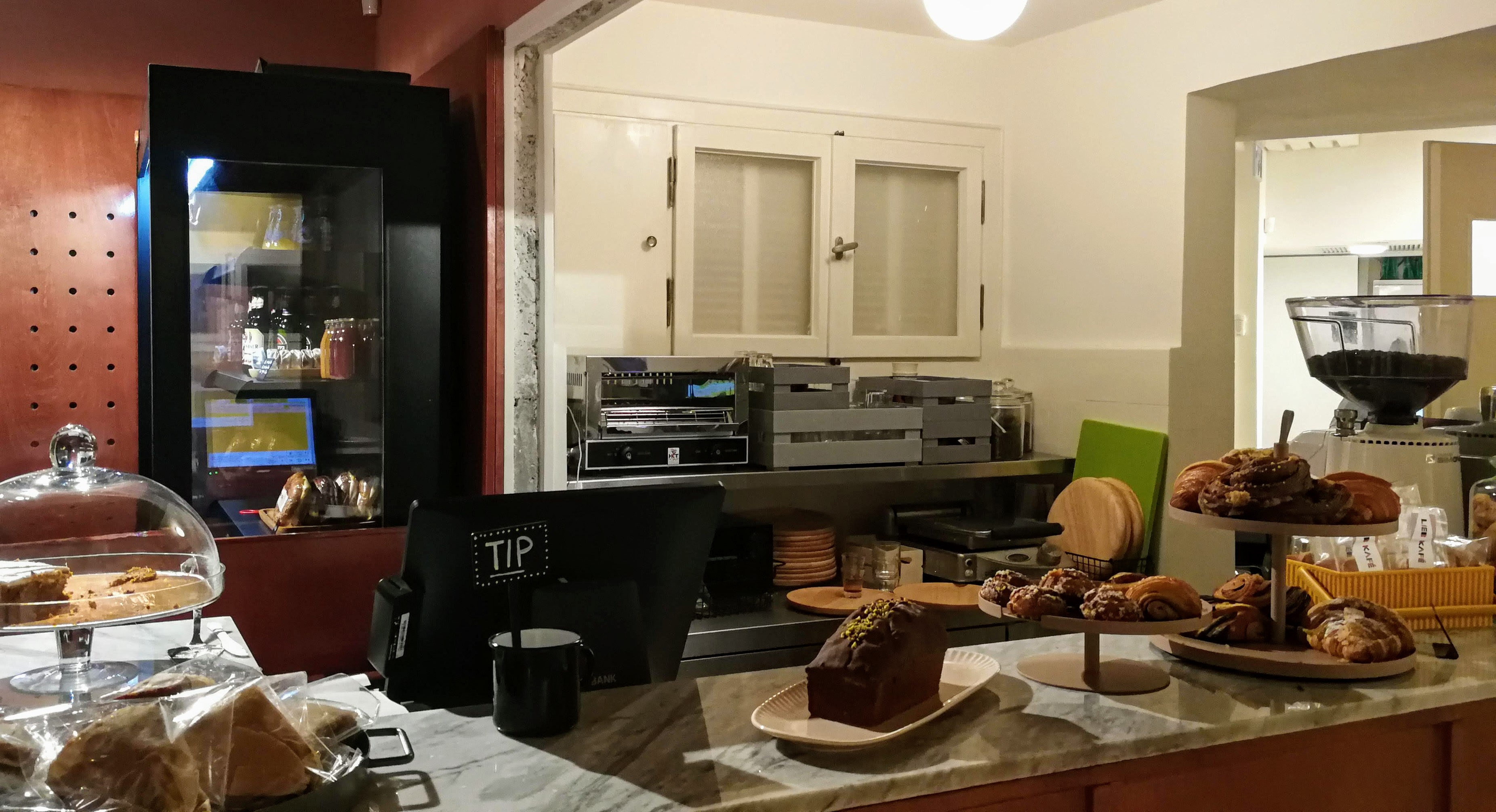 בית הקפה בקומת הכניסה של הבנין המשוחזר. במהלך השיפוץ נמצא במקום ספר מתכונים של משפחת שויער שגרה בעבר בבניין, והמתכון לשטרודל שלה ייכלל בתפריט בית הקפה. בית מקס ליבלינג, מרכז העיר הלבנה, בניין מודרניסטי בסגנון באוהאוס בעל משמעות אדריכלית. הבית ממוקם ברחוב אידלסון 29, תל אביב. תוכנן על ידי האדריכל דב כרמי ונבנה בשנת 1936.